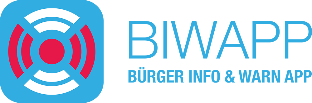 Logo der kommunalen Warn-App BIWAPP